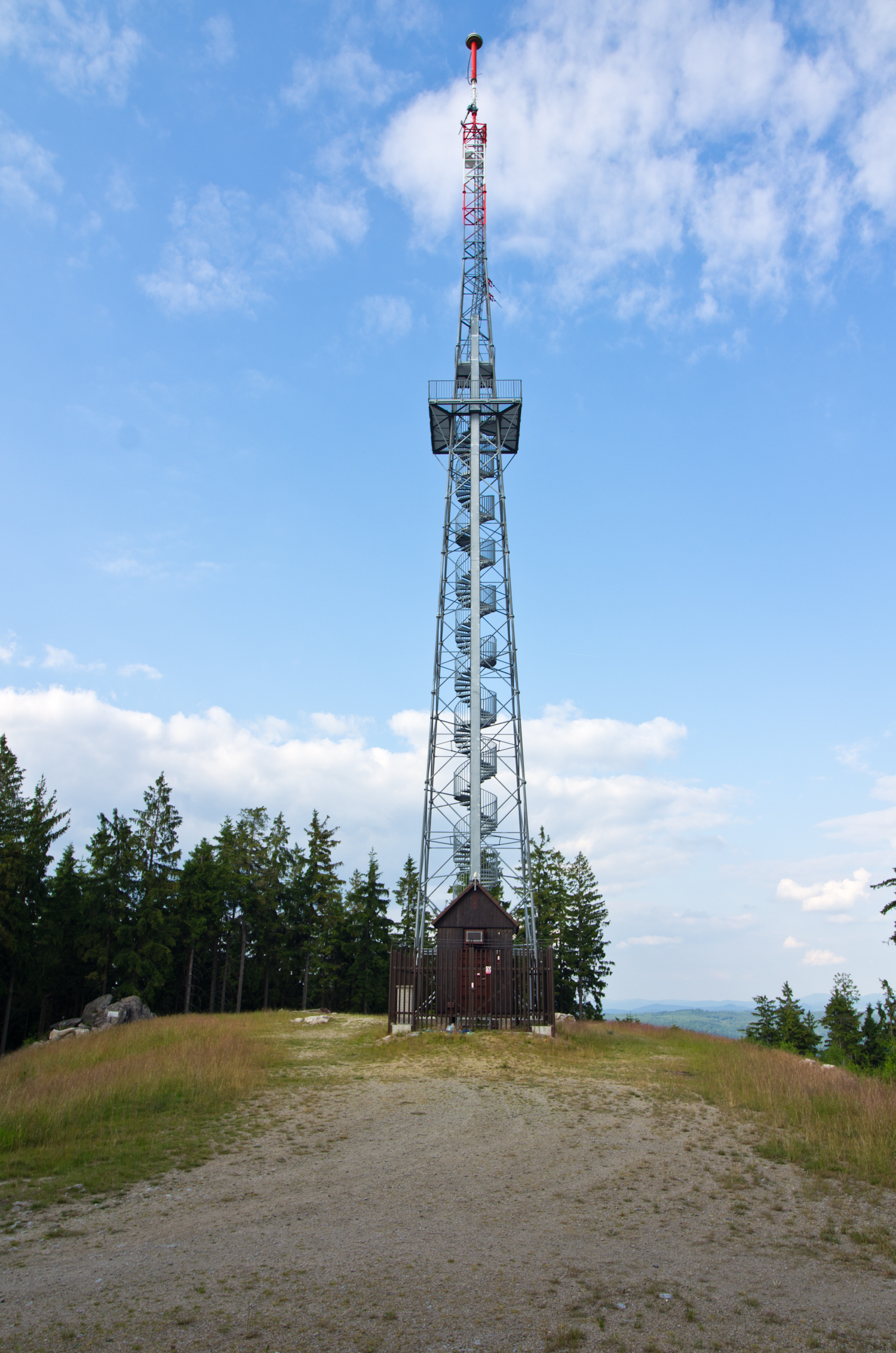 rozhledna na vrchu Krudum Slavkovský les